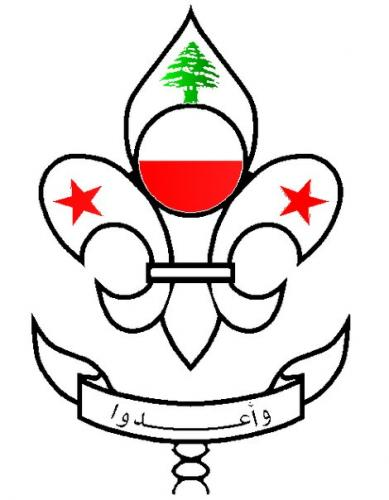 شعار جمعية كشافة الرسالة الاسلامية